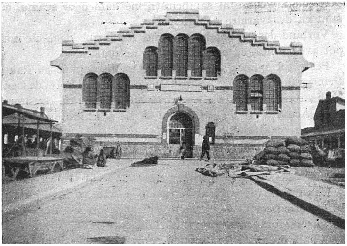 1910 - Hala Obor, București, România